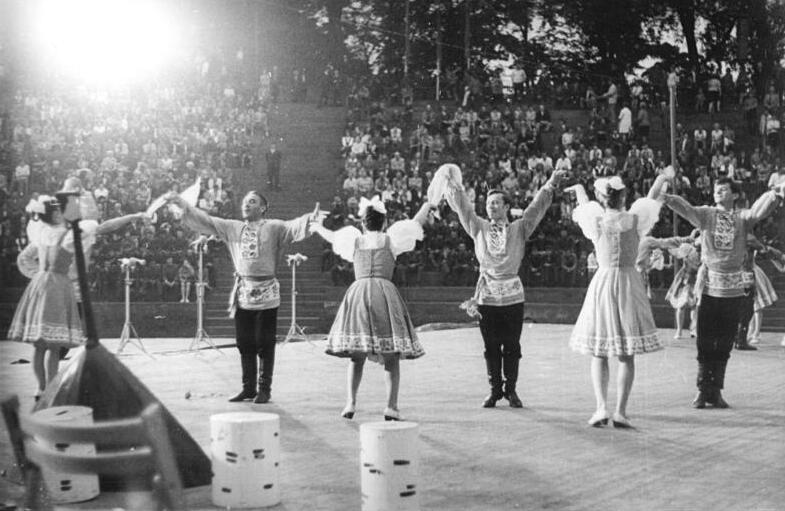 Borna, 13. Arbeiterfestspiele, Tanzgruppe ADN-ZB Kluge 29.2.72 Bez. Leipzig: 13. Arbeiterfestspiele- Freudig begrüßte und mit viel Beifall bedachte Gäste der 13. Arbeiterfestspiele waren in Borna die sowjetischen Volkskünstler vom Ensemble der Gewerkschaften der UdSSR. Die Sänger und Tänzer traten am 4.6.71 auf der Freilichtbühne in Borna, der Bergarbeiterstadt, auf.